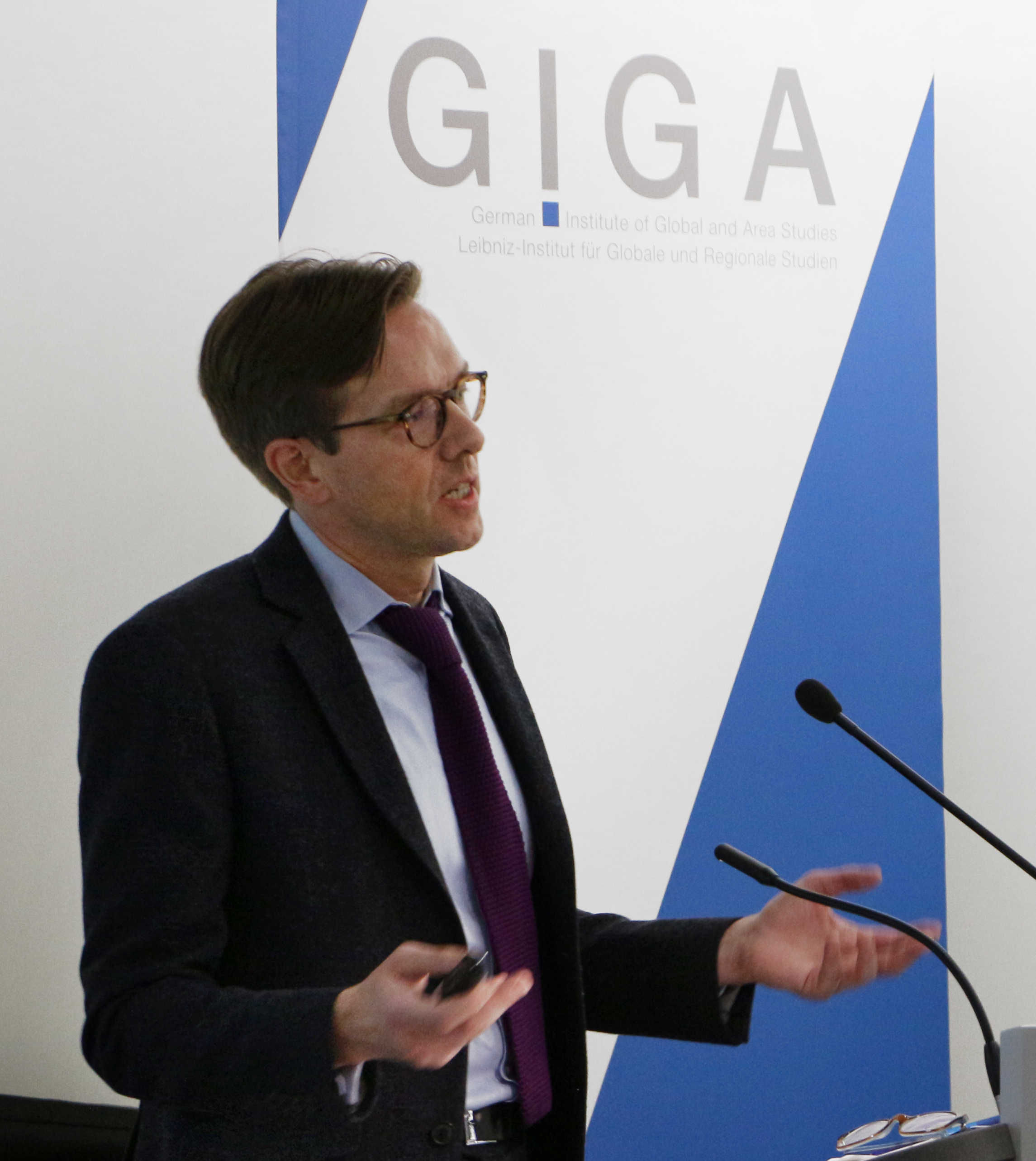 Prof. Dr. Patrick Köllner, GIGA German Institute of Global and Area Studies, bei der Hamburger Nacht des Wissens 2017